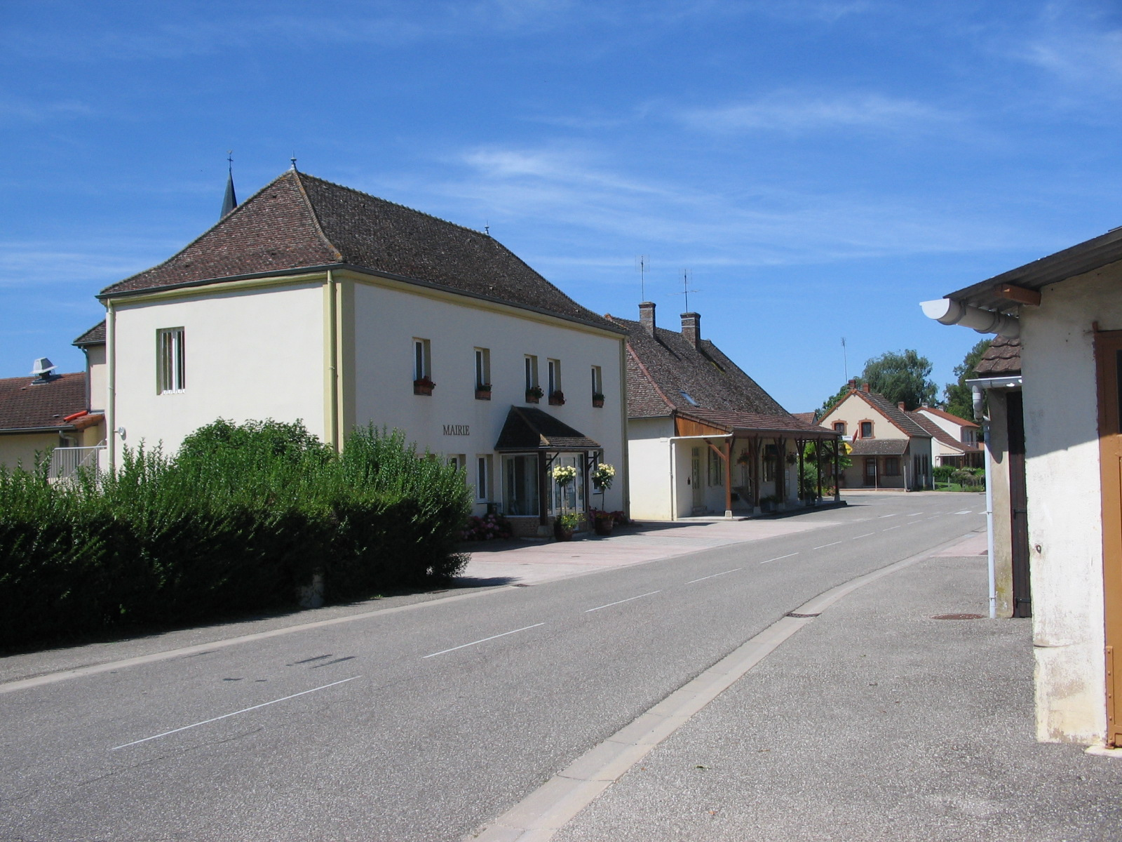 La mairie du village de Montret (Saône-et-Loire, Bourgogne, France) photographiée en juillet 2012.